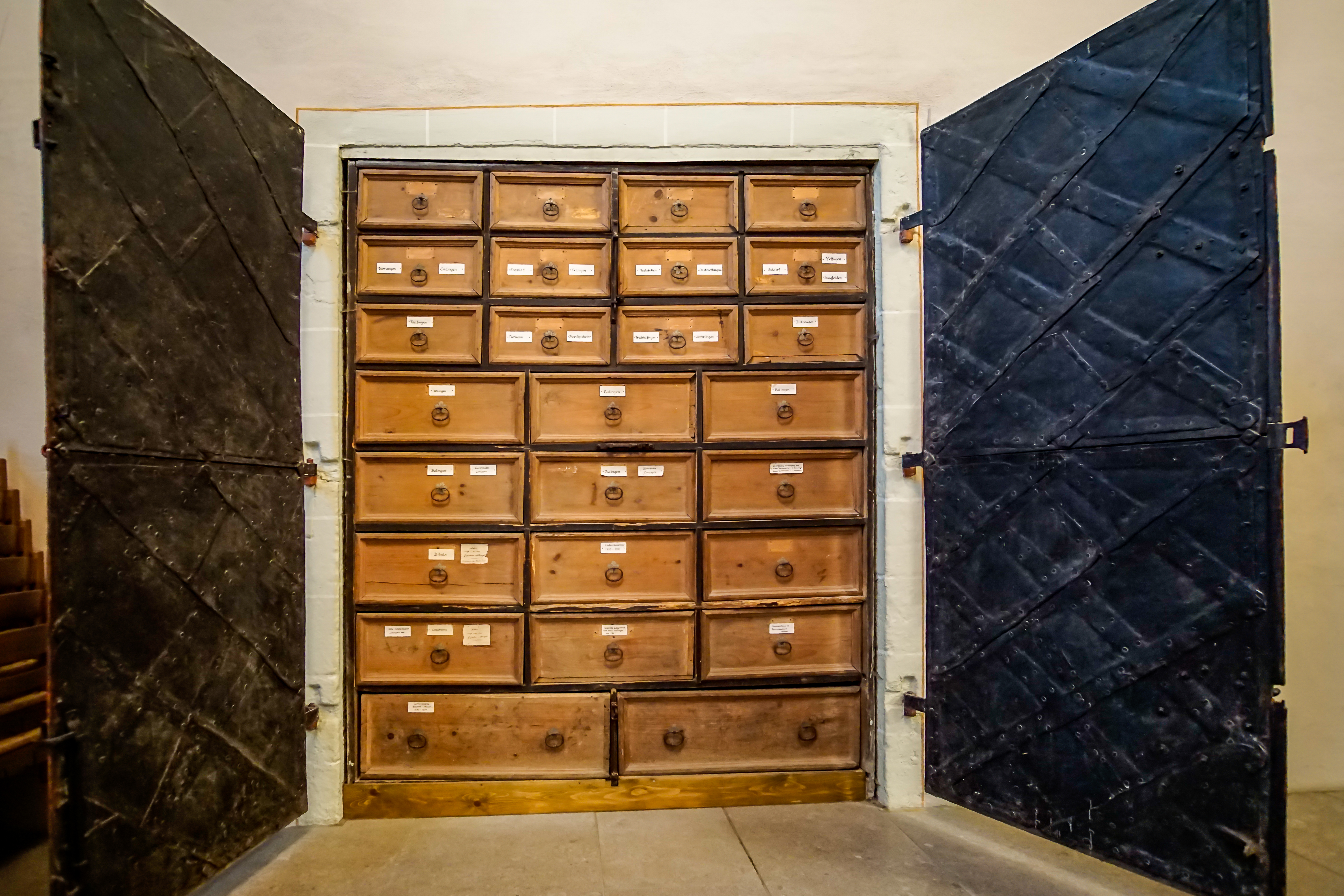 Stadtkirche Balingen: Registratur Wandschrank der Heiligenvogtei